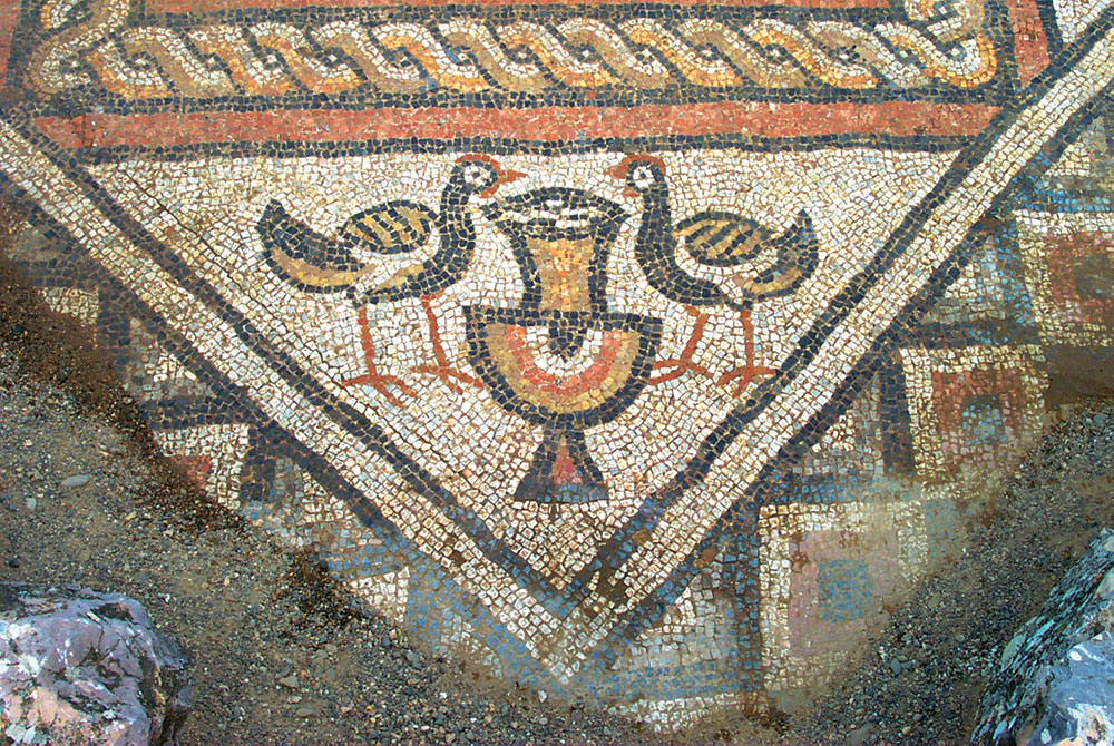 Mozaiku I Linit